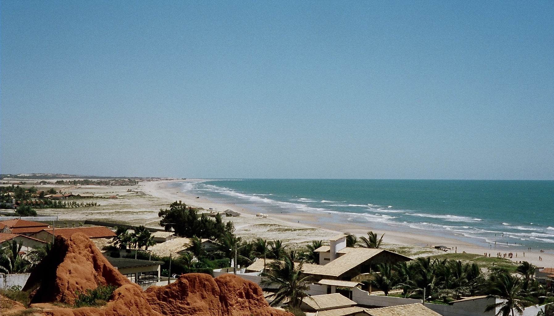 Strand von Beberibe, Blick vom Morro Branco nach NW